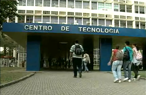 Universidade Federal do Rio do Janeiro, UFRJ, Rio de Janeiro, Brasil.